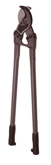 Кабелерез (иструмент ручной)